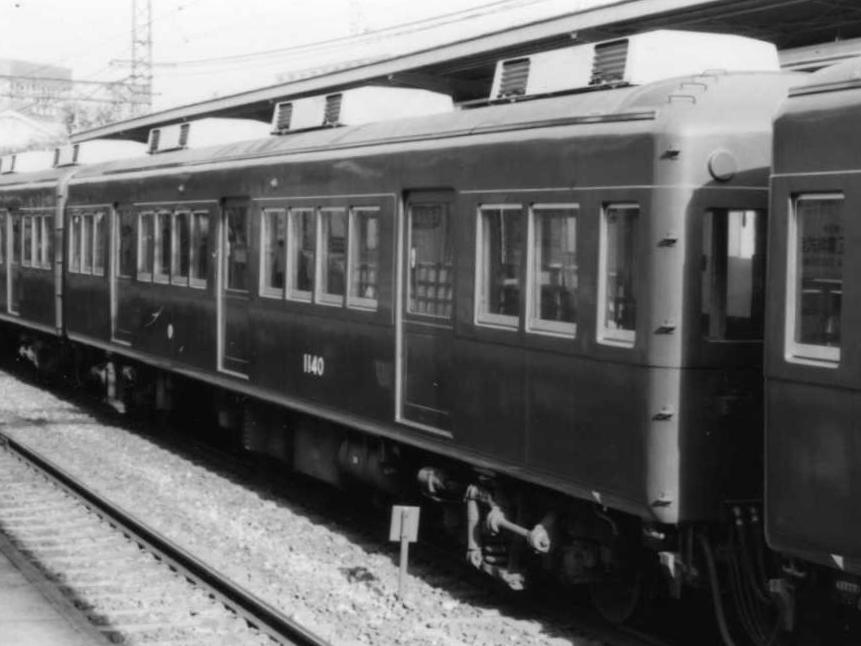 運転台、運転室扉が完全に撤去された1140 1977.11.20 池田にて